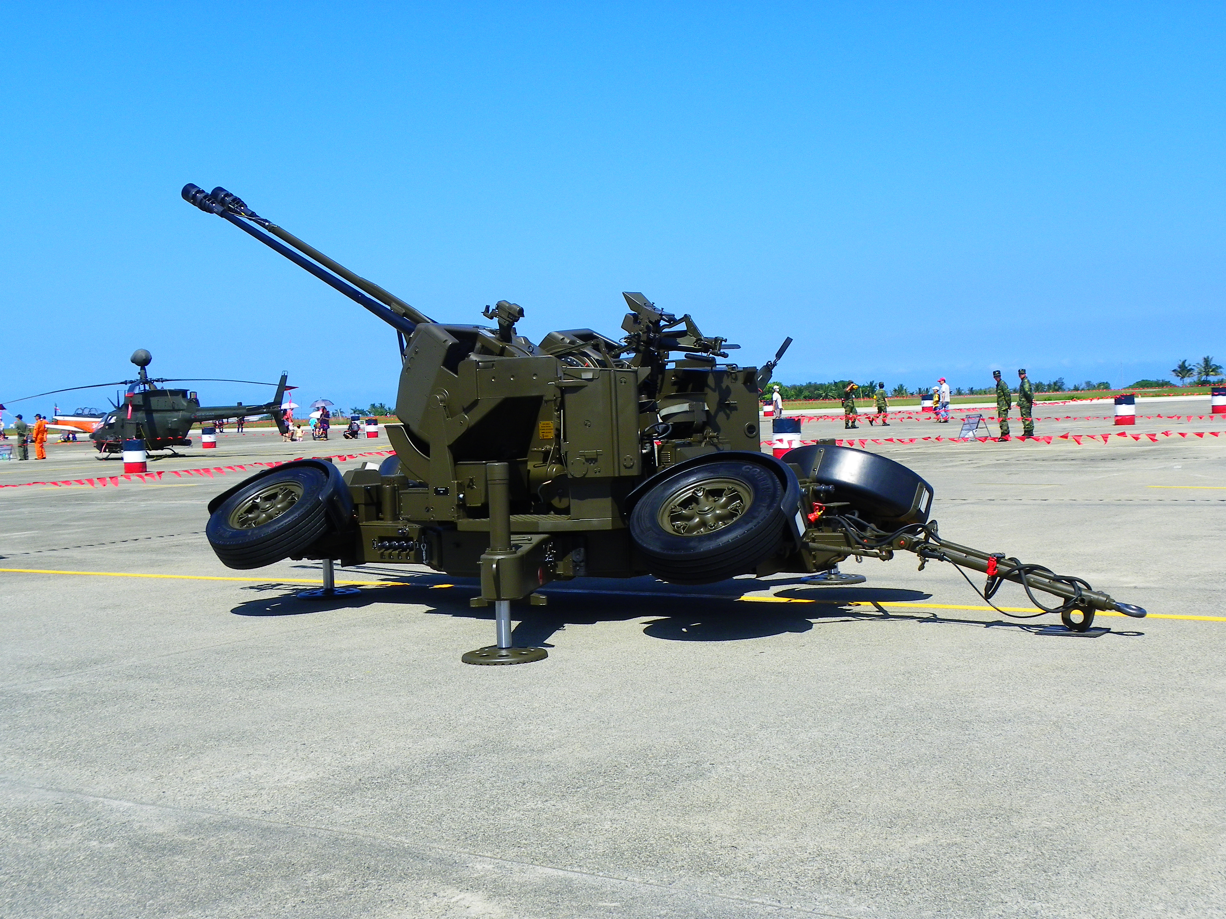 2013年空軍志航基地營區開放活動，停機坪展示之奧立崗GDF-006 35聯裝快砲。